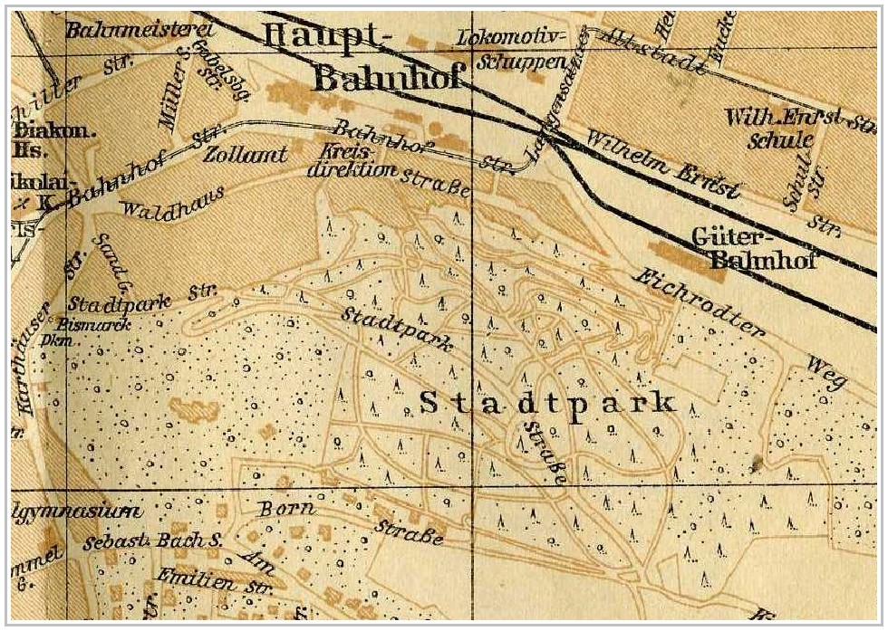 Ausschnitt der Kartenbeilage mit dem Stadtpark von Eisenach